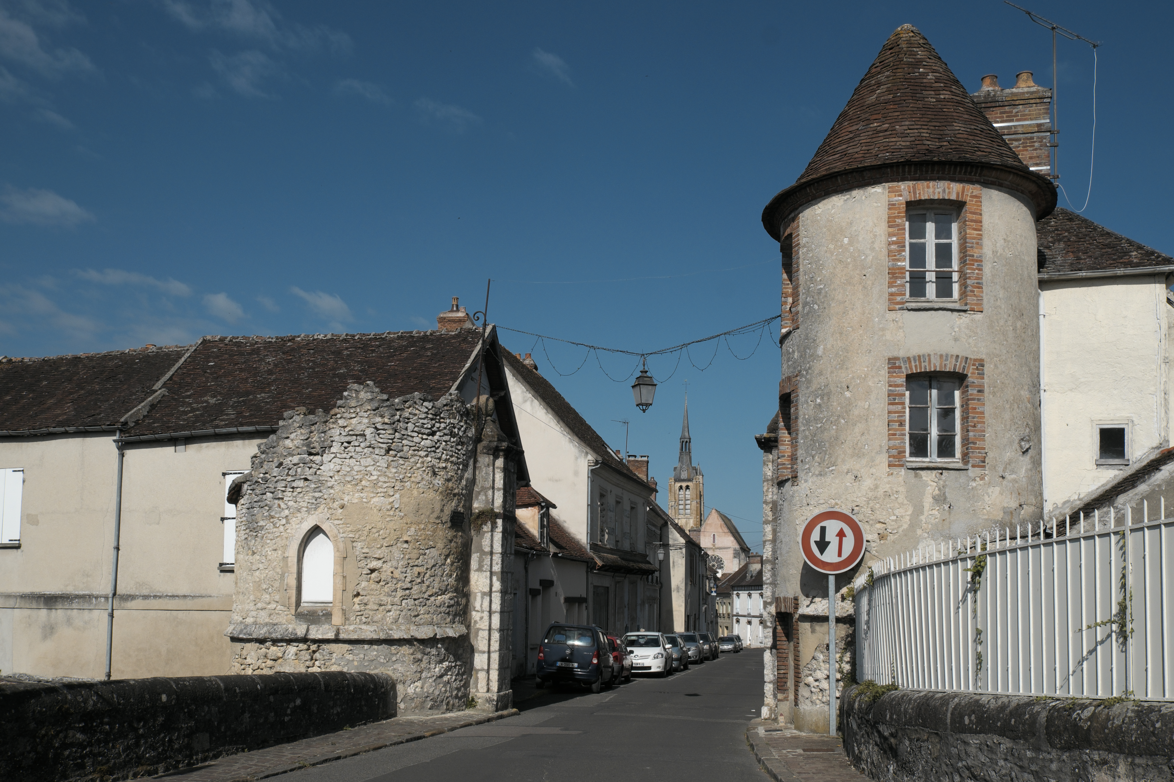 Reste der Stadtbefestigung in Donnemarie-Dontilly im Département Seine-et-Marne (Île-de-France/Frankreich)